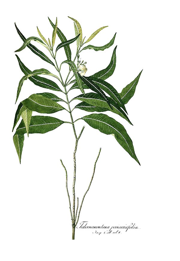 Illustration of Tabernæmontana persicariæfolia. 320 (Tabernaemontana persicariifolia Jacq., )